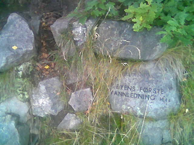 Kristiansands første vannledning fra 1844